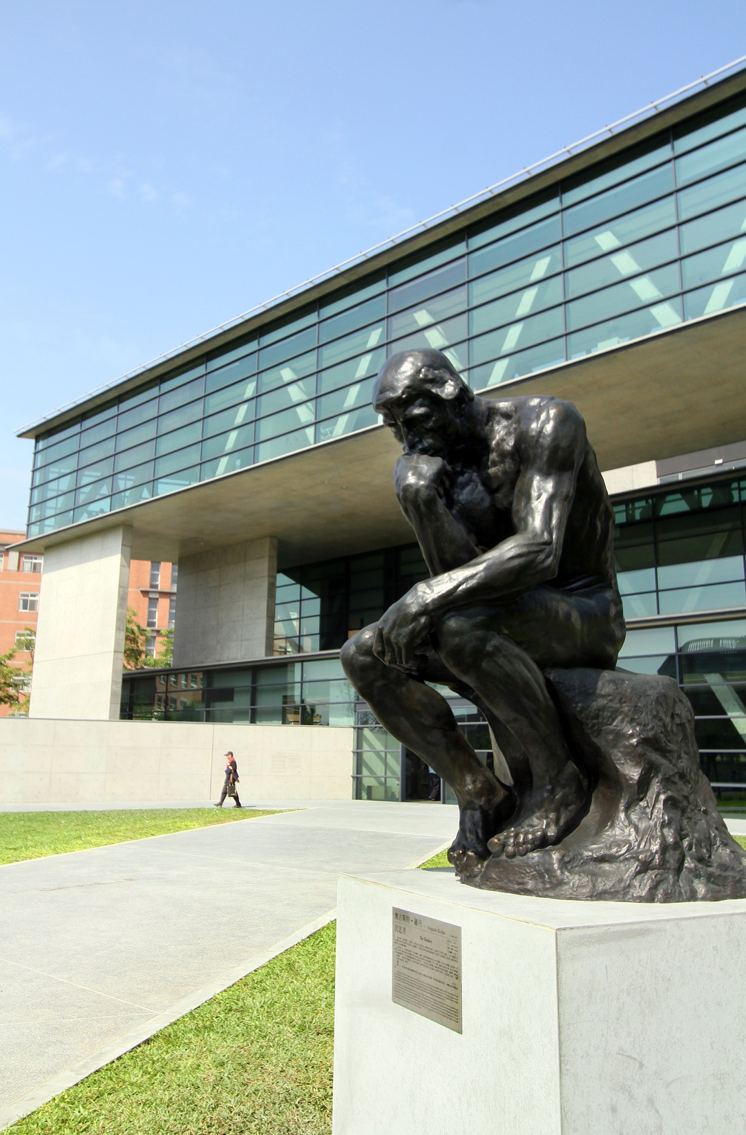 亞洲現代美術館沉思者複製品。